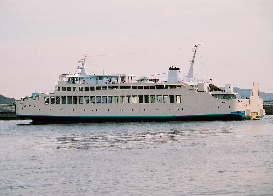 宇高国道フェリー 高松－宇野航路フェリー 加藤汽船 ふじ丸